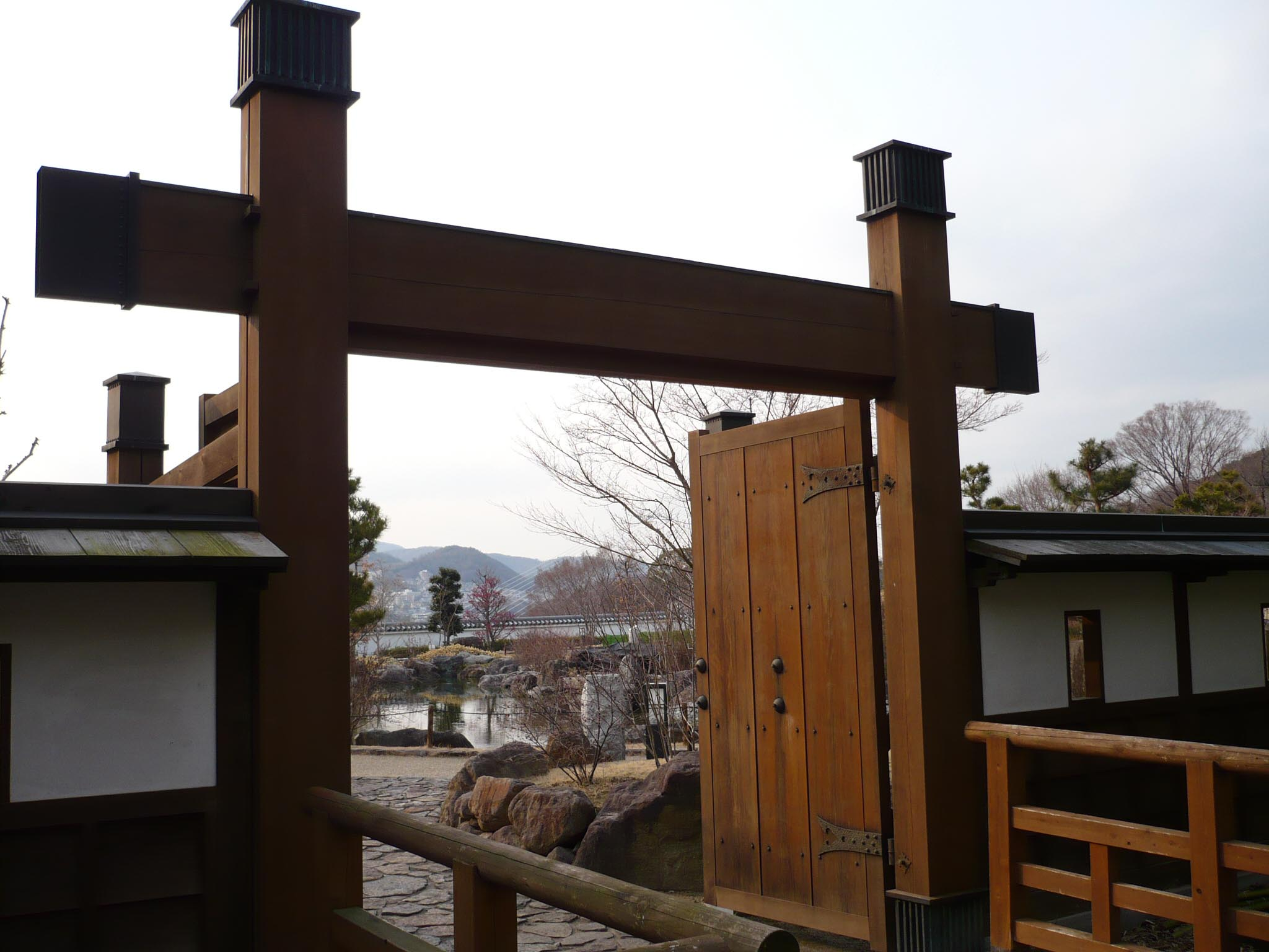 池田城の虎口跡